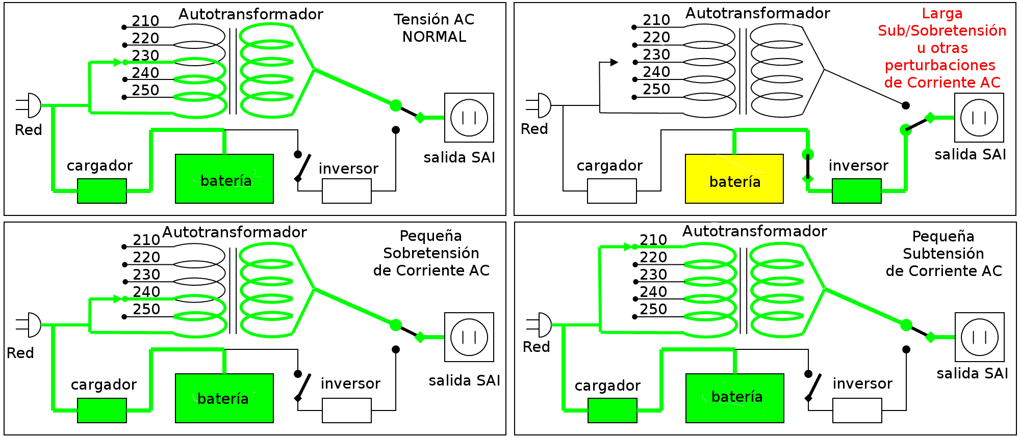 Diagrama de funcionamiento de un SAI online o de línea interactiva.